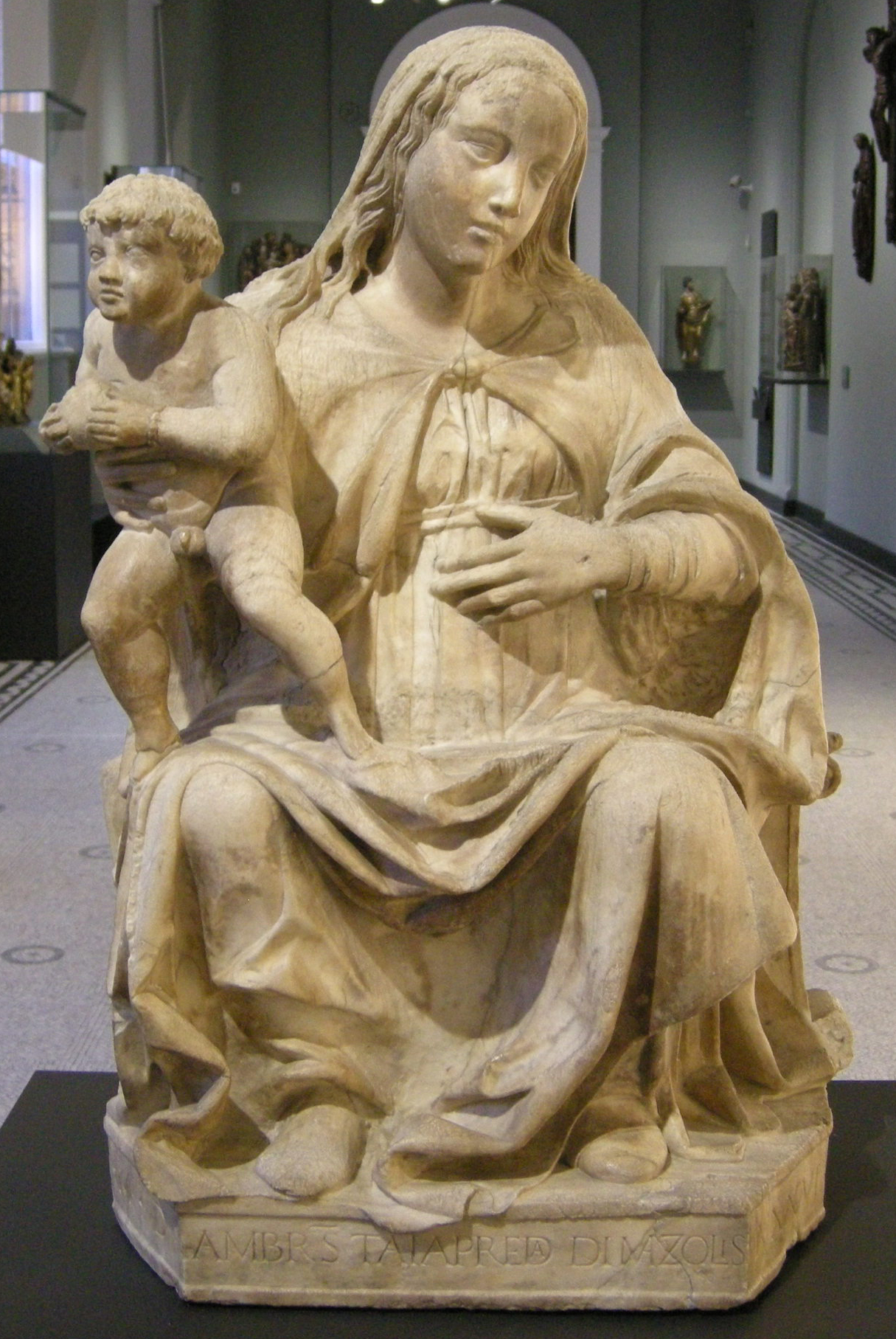 Ambrogio di mazolis, madonna col bambino, 1536